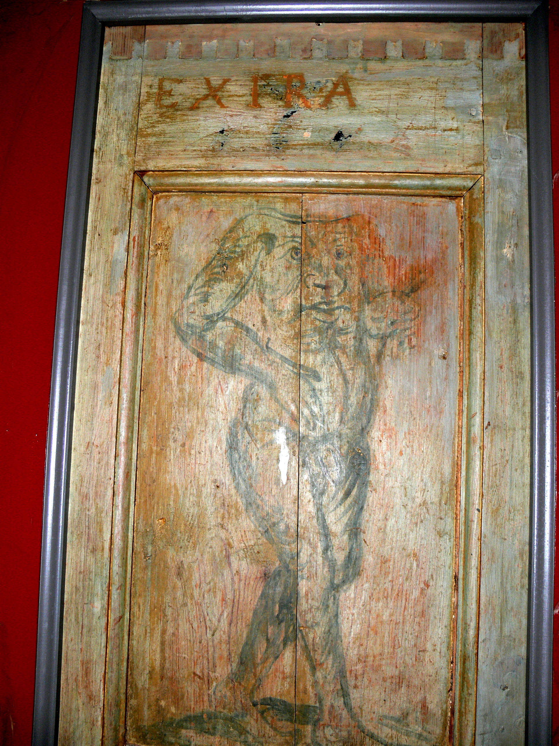 Gothem kyrka auf Gotland. Kirchenschrank: Barockes Emblem - Mann mit Gesicht auf dem Körper ( Motiv aus der Schedel´schen Weltchronik )